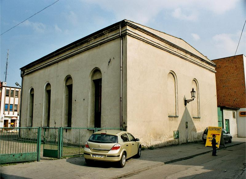 Synagoga w Jarocinie